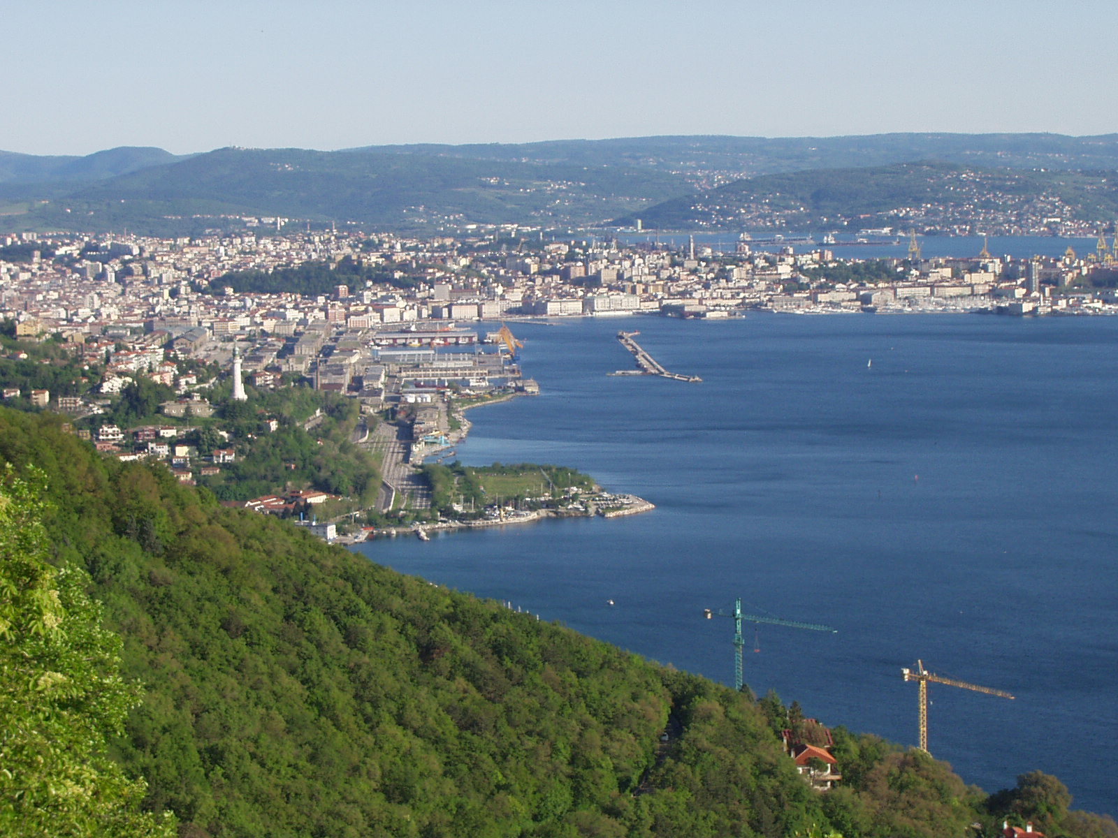 Mezza città Trieste